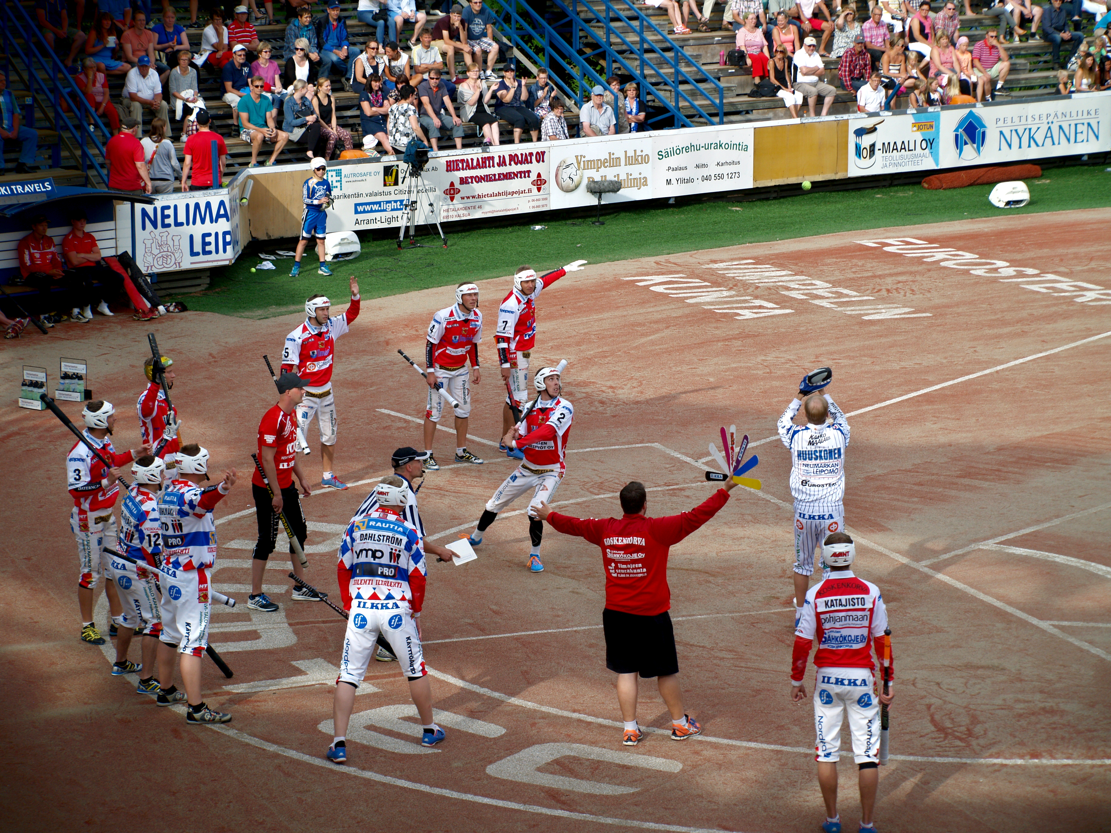 Vimpelin Veto - Koskenkorvan Urheilijat pesäpallo-ottelu 1.8.2014. Kuvassa lyömässä Juuso Myllyniemi.